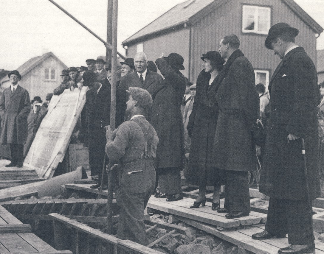 Norra Ängby. Axel Dahlberg (barhuvad i mitten) med prinsen of Wales hans bror prins George och svenska kronprinsen Gustav Adolf (längs till höger i bild)